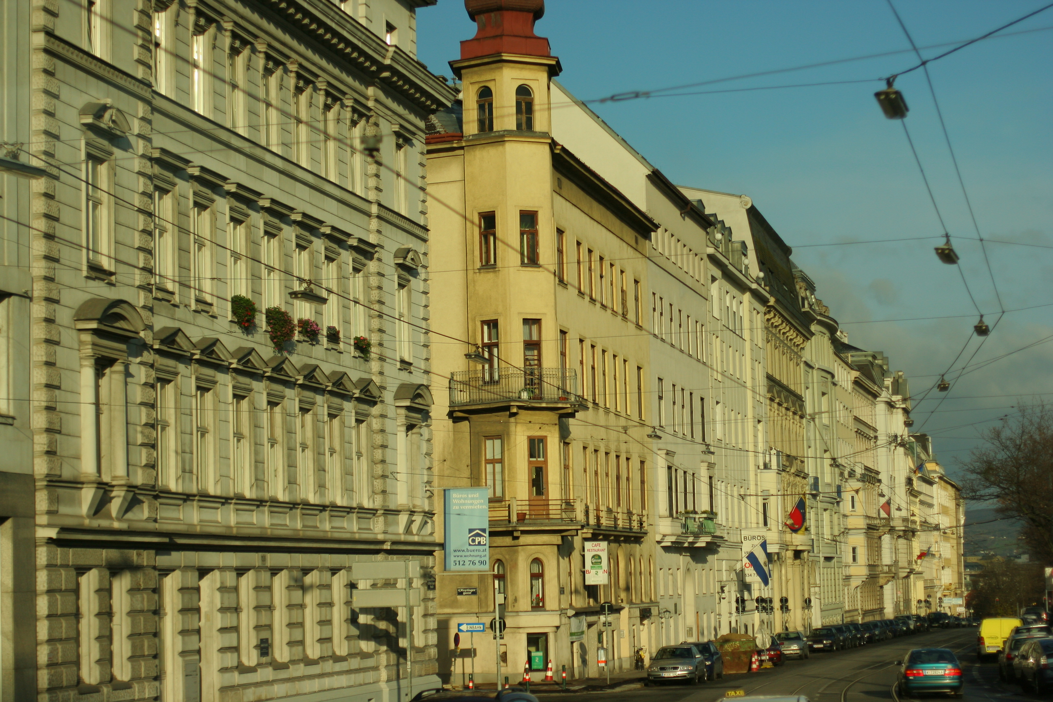 Embassies of El Salvador and Venezuela in Vienna, Austria